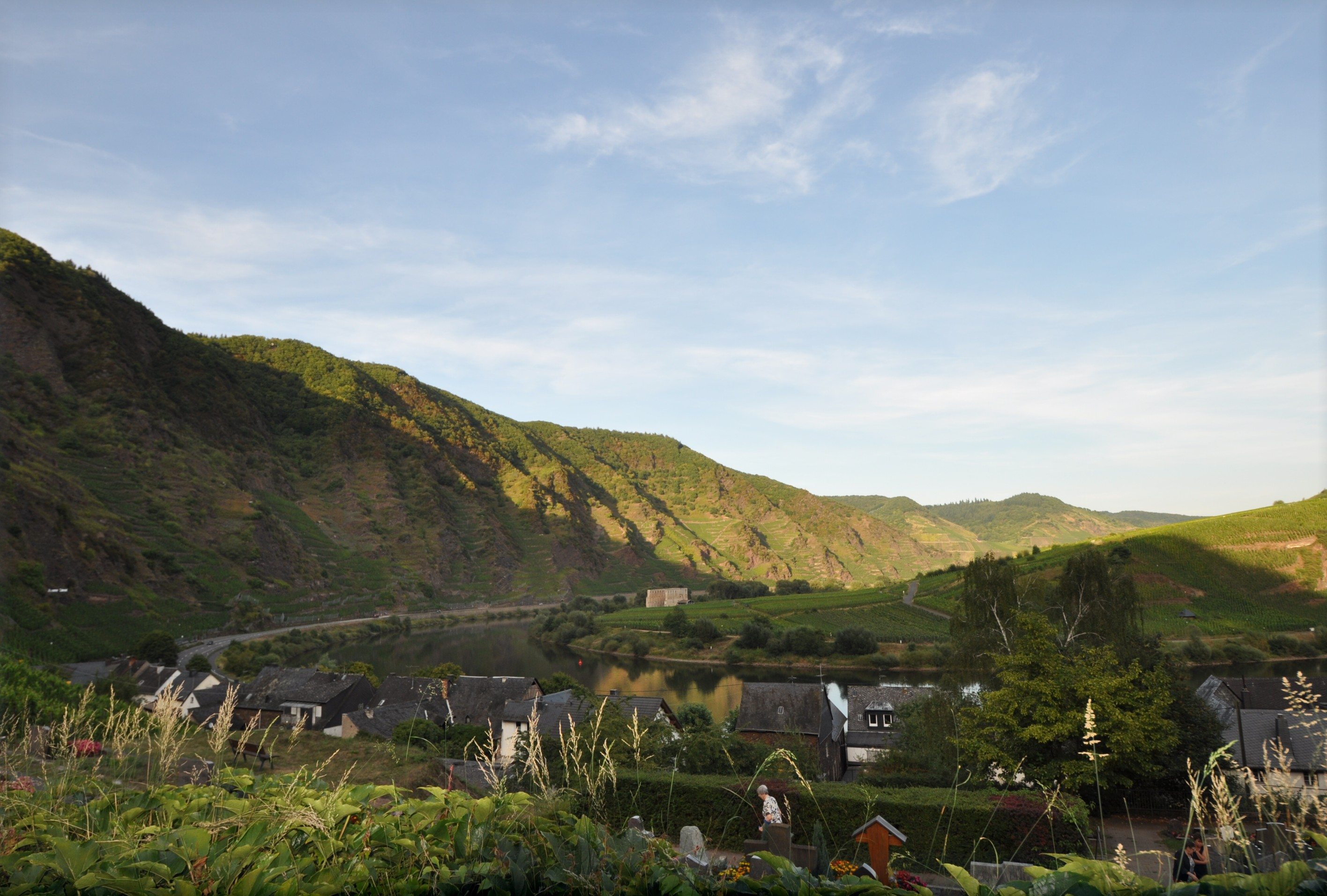 Calmont Bremm